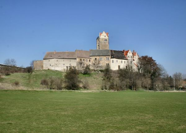 eigenes Foto von 2005, public domain, Schloss Plötzkau Mewes 21:07, 9. Nov 2005 (CET)